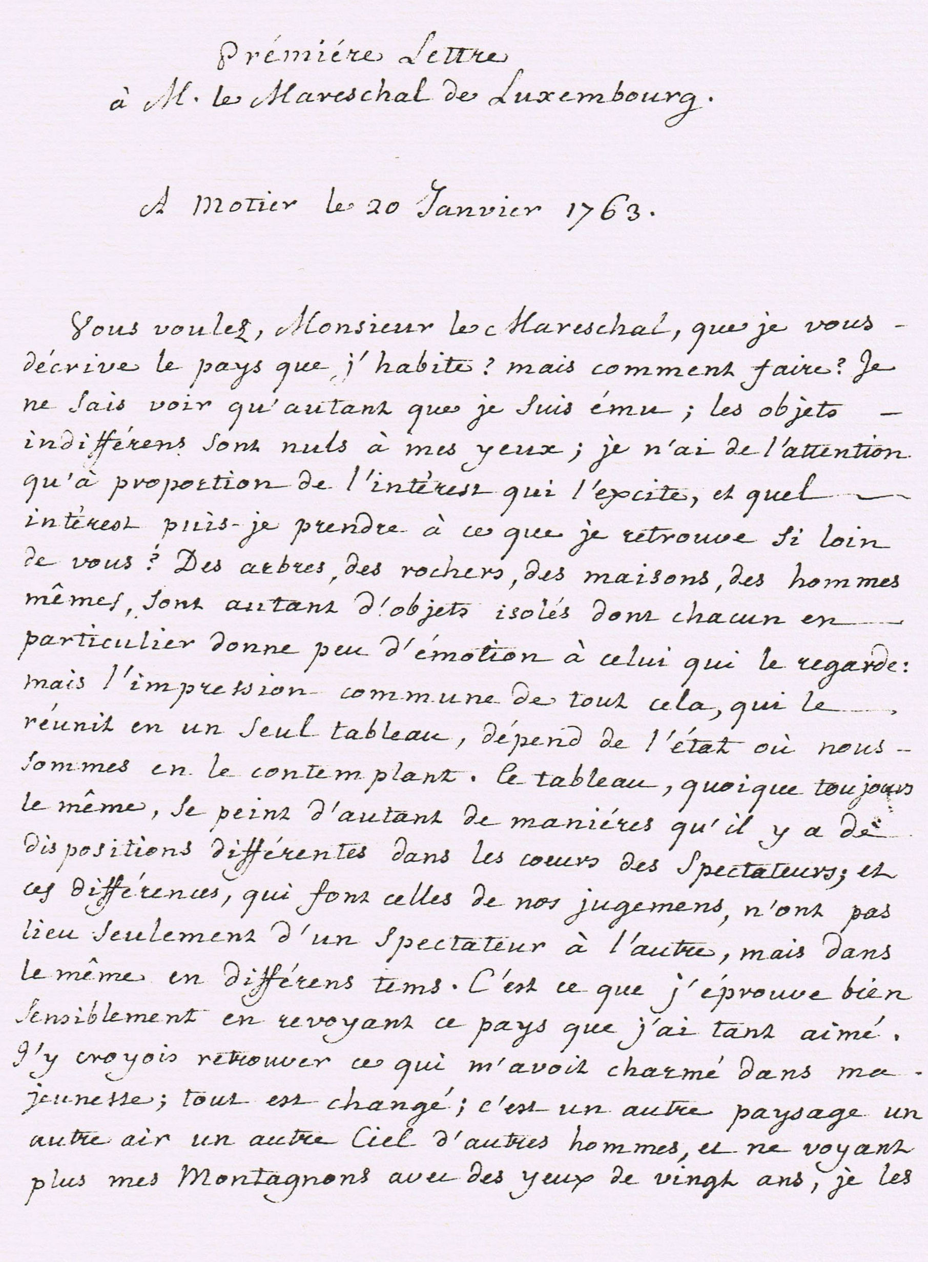 Facsimile 1st page of Jean Jacques Rousseau's original manuscript for "Deux Lettres à M. le Mareschal Duc de Luxembourg contenant une Description du Val-de-Travers"